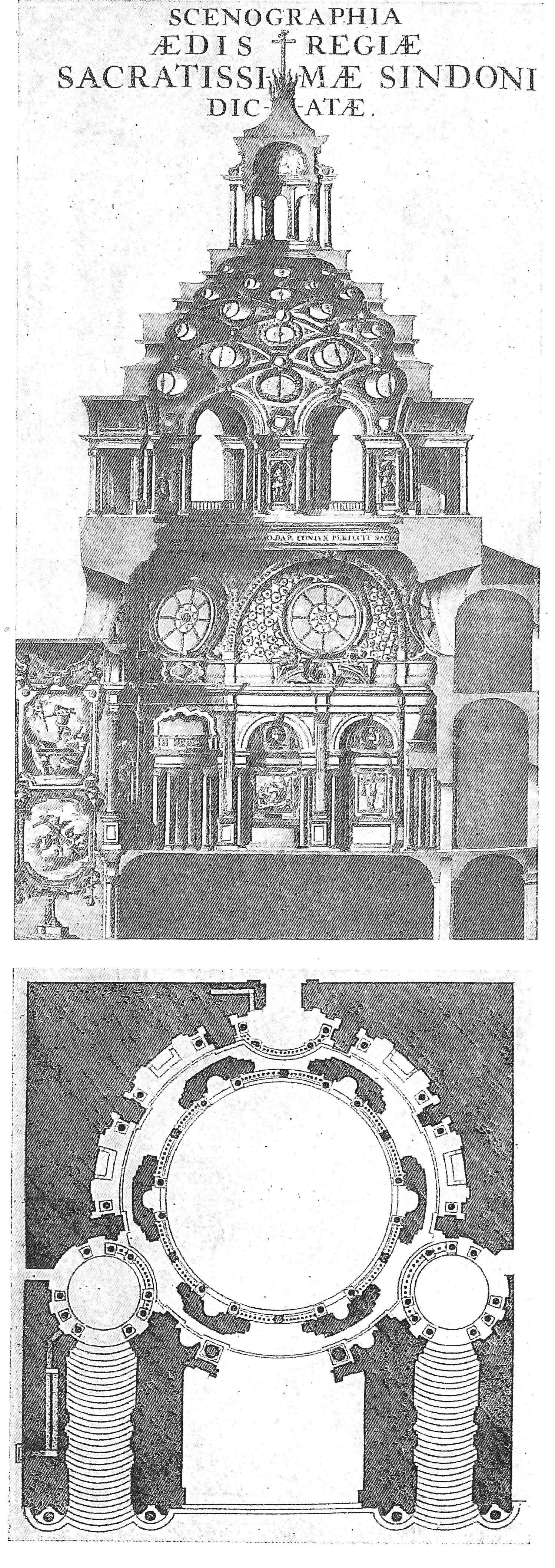 Guarino Guarini: Scenographia Aedis Regiae Sacratissimae Sindoni Dicatae, Amsterdam 1682 / Grabtuchkapelle in Turin, Kupferstich, Titelblatt der Architekturpublikation Guarinis.